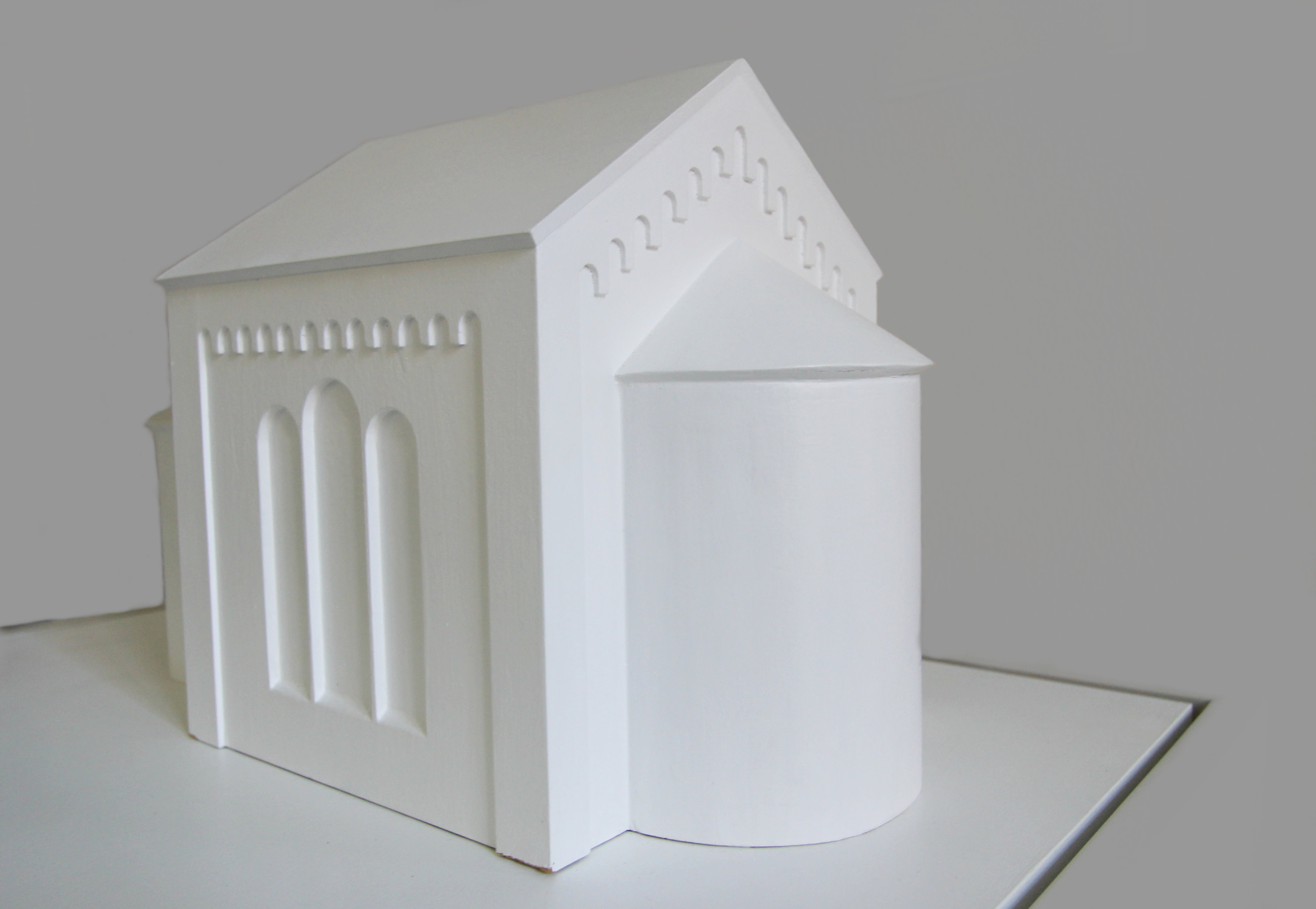 54634 Bitburg, Trierer Straße 15, Kreismuseum Bitburg-Prüm. Die Synagoge in Bitburg wurde von Kreisbaumeister Peter Josef Julius Wolff entworfen und ab 1877 errichtet. Die Synagoge stand etwas erhöht auf einem eingefriedeten Grundstück und befand sich in der Rautenbergstraße. Modellbau von Hendrik Arz. Aufnahme von 2018.